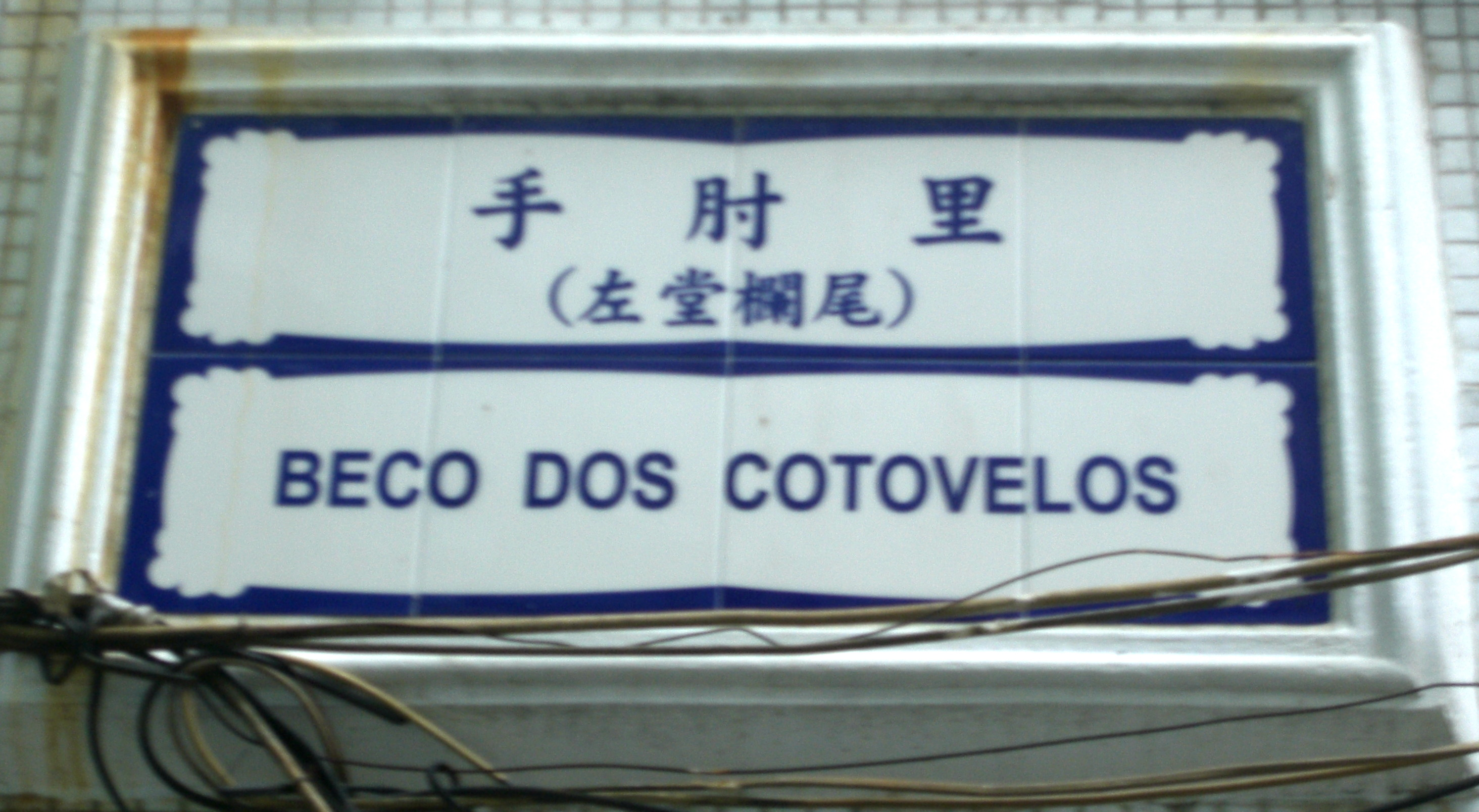 Beco dos Cotovelos